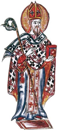 Выдающийся армянский ученый и писатель средневековья Мхитар Гош